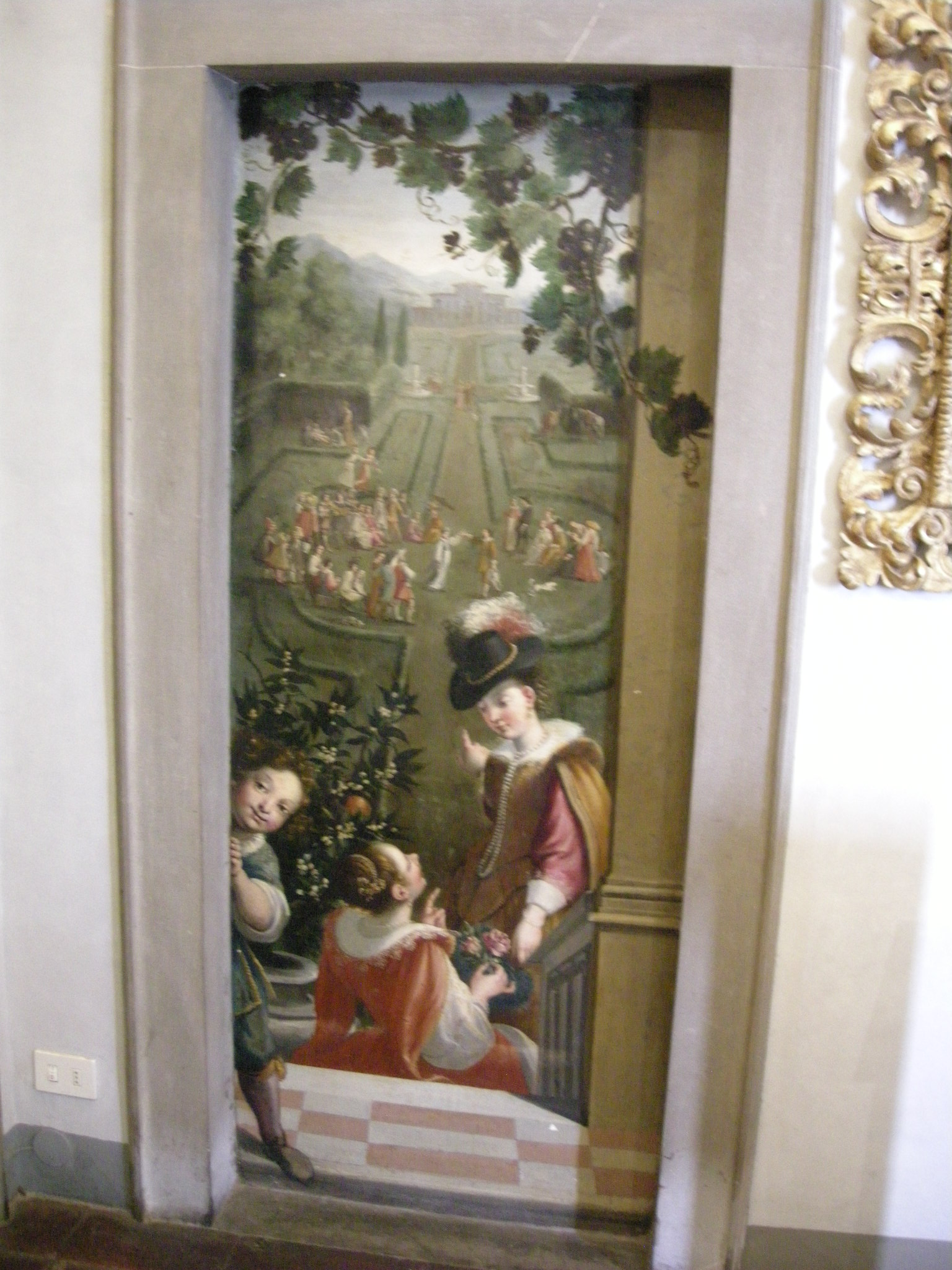 Casa buonaroti, camera della notte e del dì, 05 baccio del bianco